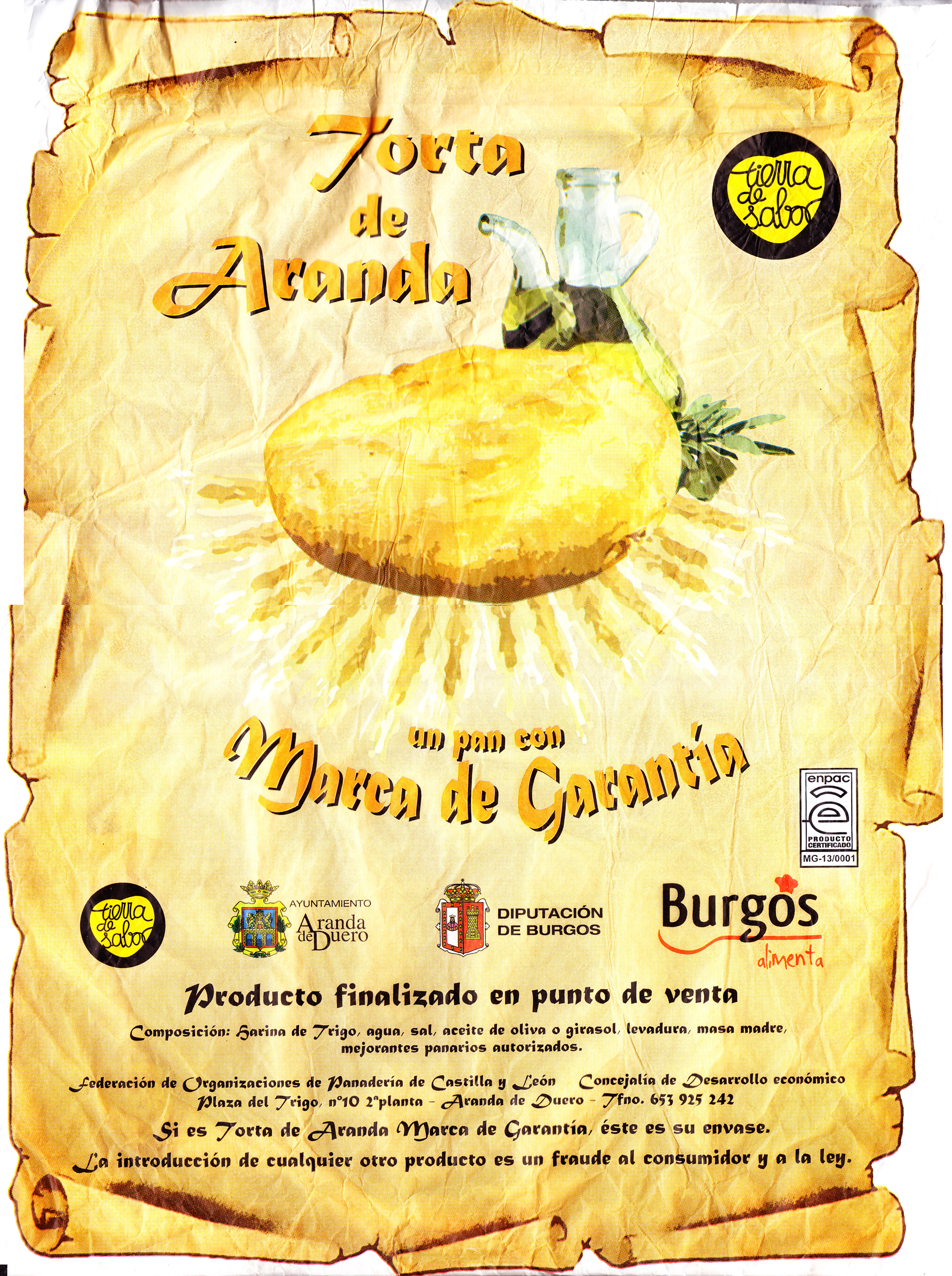 Envase de norma de calidad de la Torta de Aranda, que incluye el logotipo y varias especificaciones. Es un envase comercial que acompañaba a una torta comprada en el comercio en diciembre de 2015.